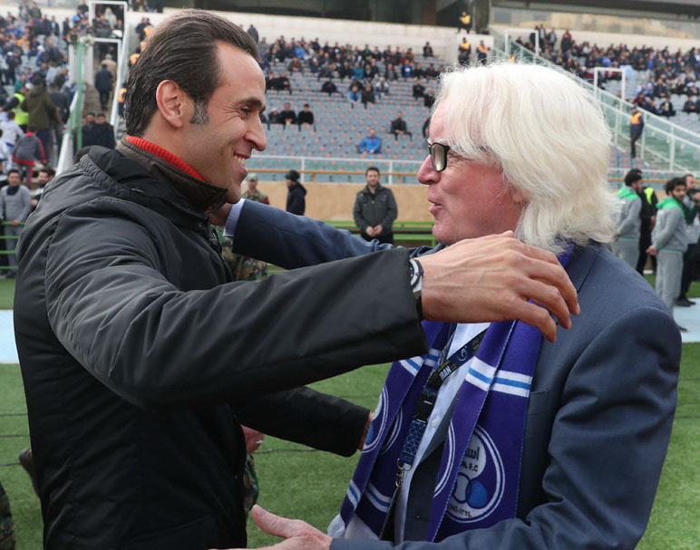 علی کریمی و وینفرد شفر- دیدار تیم‌های استقلال و سپیدرود در هفته بیست و سوم لیگ برتر- بهمن ۱۳۹۶